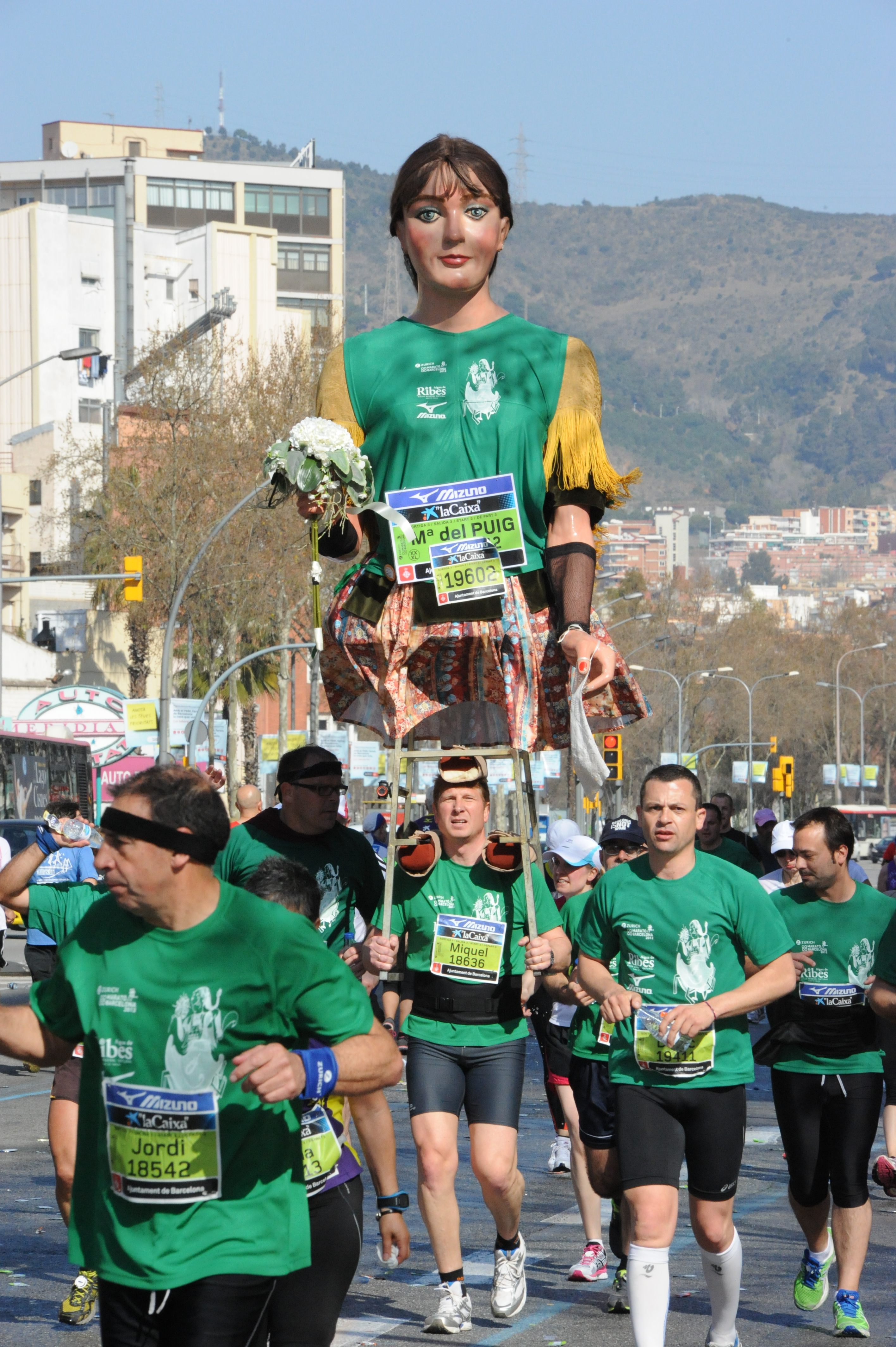 Gegant a la Marató de Barcelona 2012